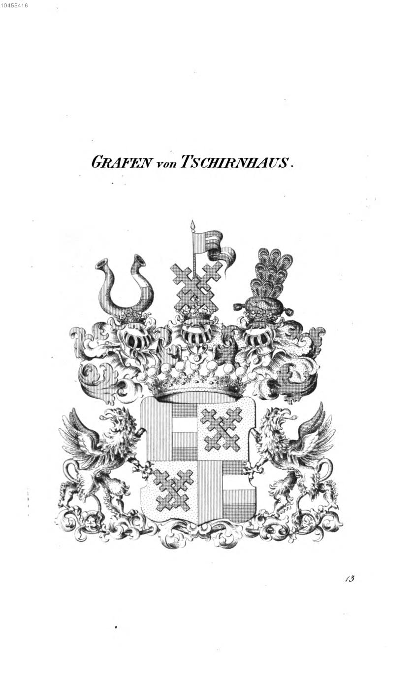 Wappen Tschirnhaus 1 - Tyroff AT.jpg